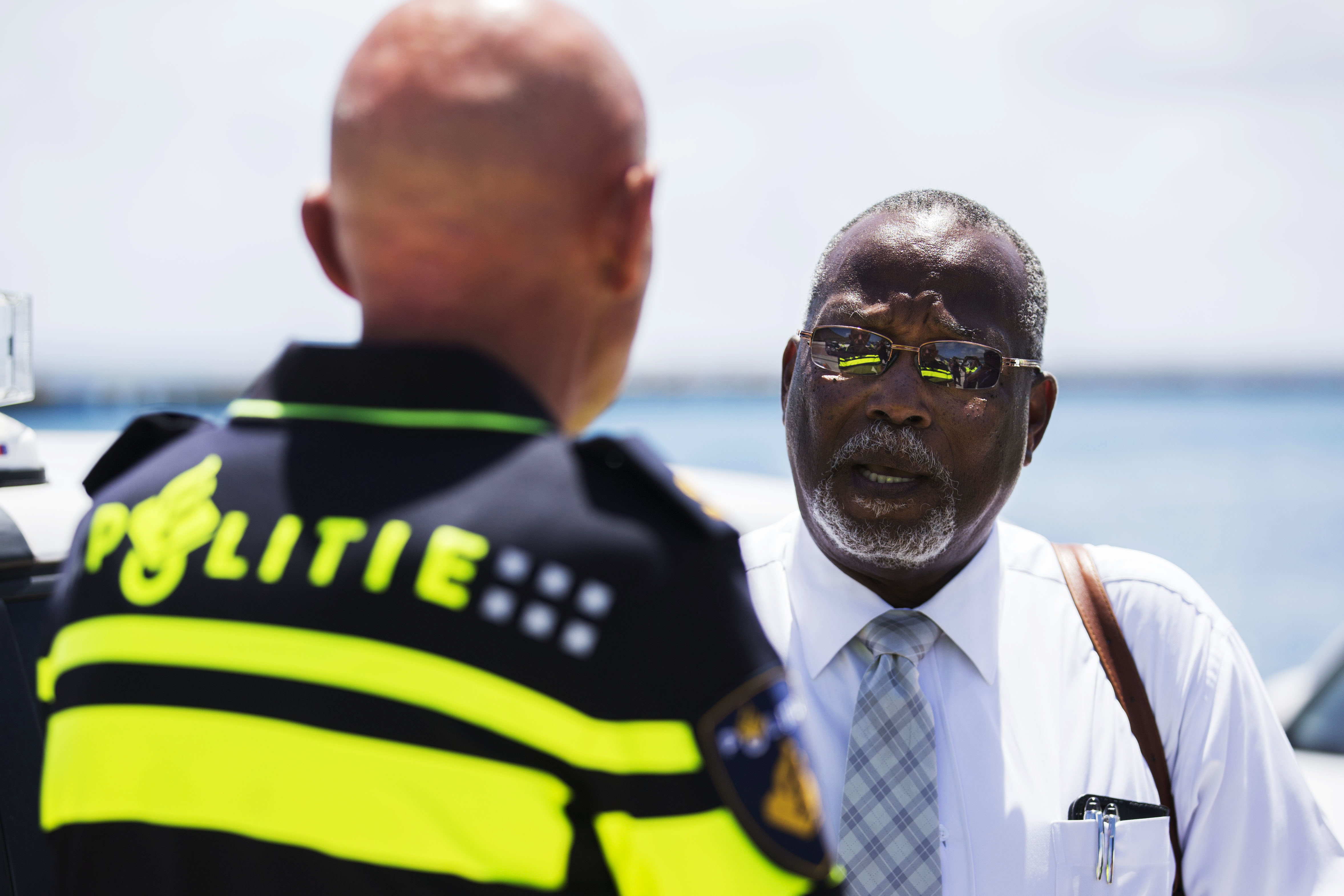 Minister van Justitie Boasman van Sint-Maarten neemt de politievoertuigen officieel in ontvangst.